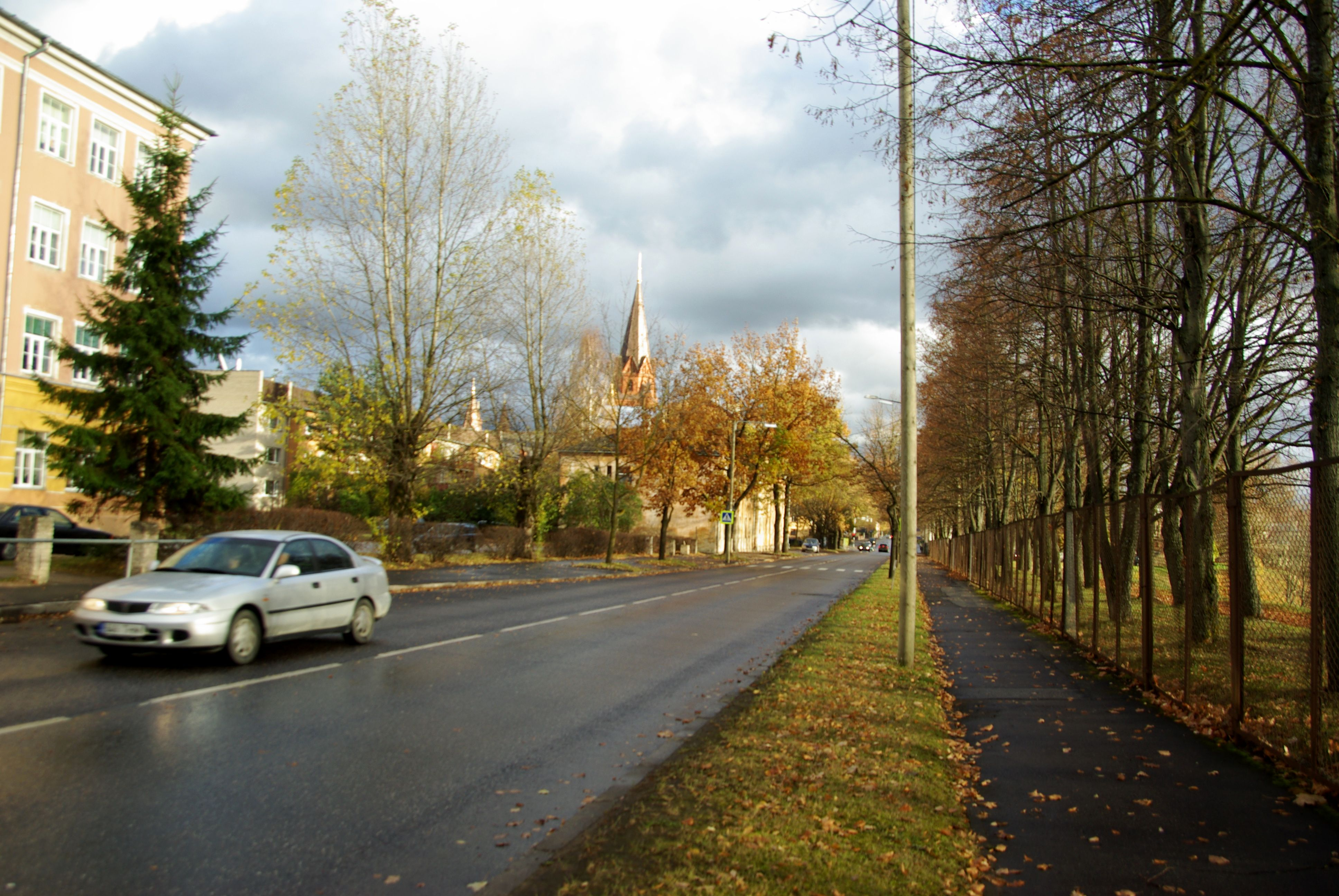 Tartu